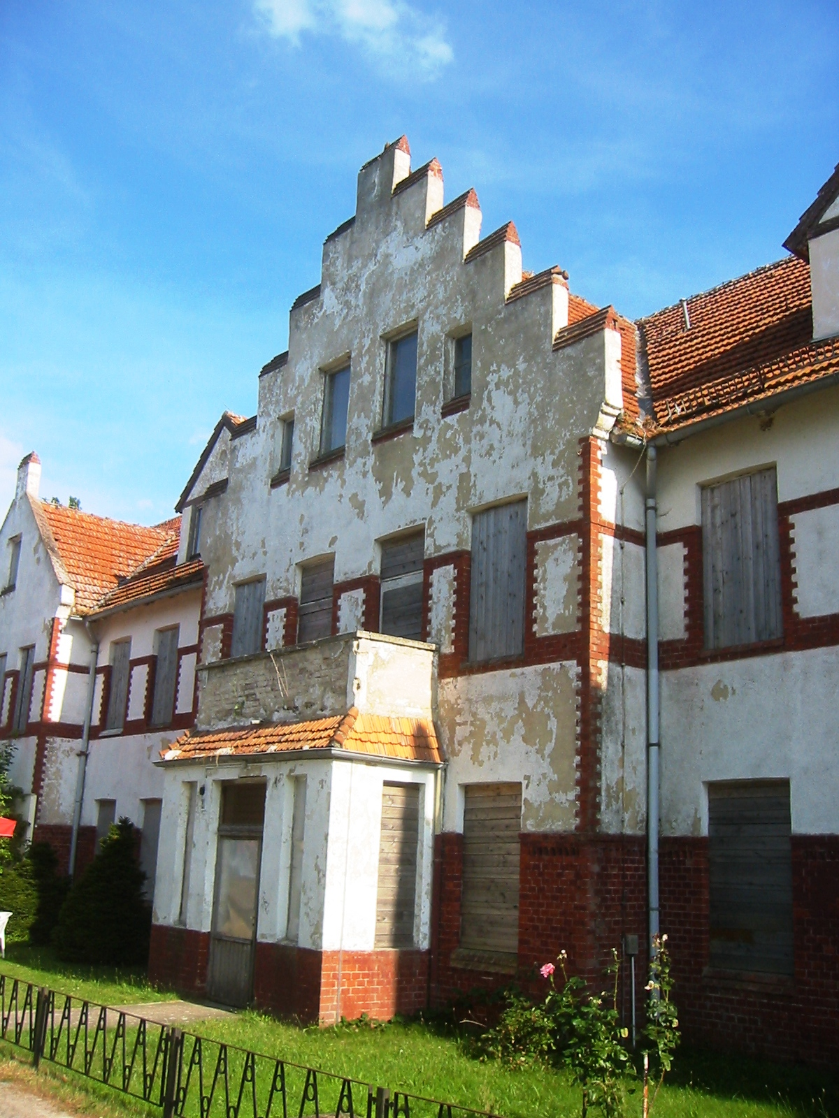 Denkmalgeschütztes ehemaliges Reichsbahnerholungsheim in Lubmin, Vorpommern-Greifswald (Mecklenburg-Vorpommern)